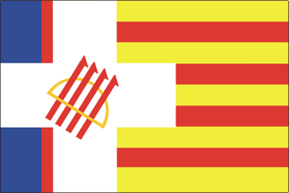 Bandera de la Dreta Regional Valenciana